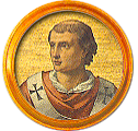 Médaillon de la frise des papes à Saint-Paul-hors-les-Murs. Il s'agit d'une mosaïque représentant Jean X, 122e pape de l'Église catholique (914-928). Il fait parie de la série de médaillons voulue par Grégoire XVI destinée à remplacer ceux de l'ancienne basilique après l'incendie de 1823.